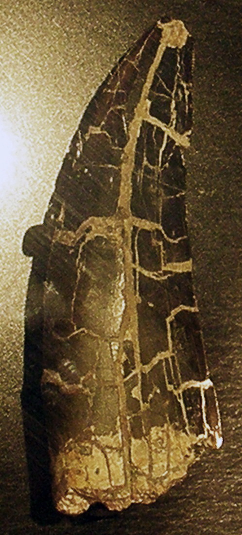 Fossil of Duriavenator, an extinct dinosaur-- Took the photo at Natural History Museum, London